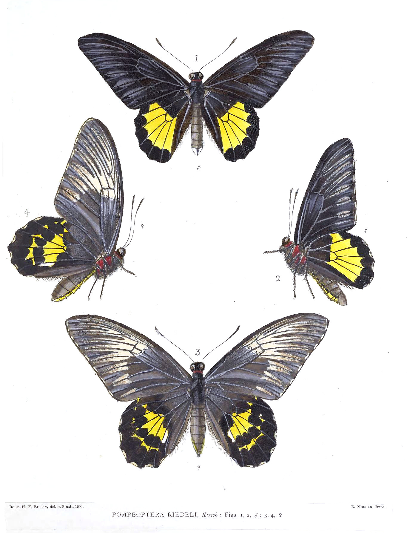 Pompeoptera riedeli = Troides riedeli